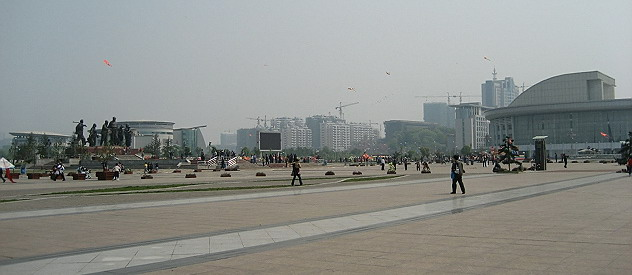 湘潭东方红广场